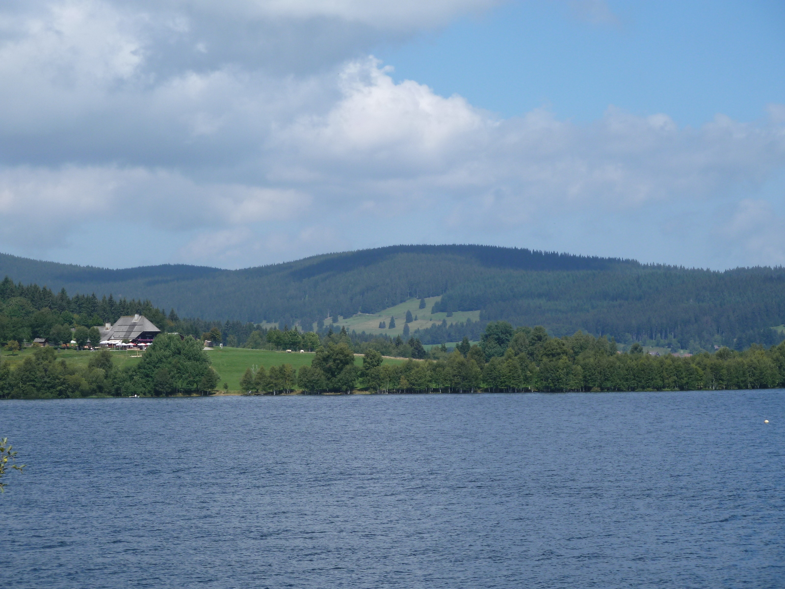 Unterkrummen, Schluchsee, Germany